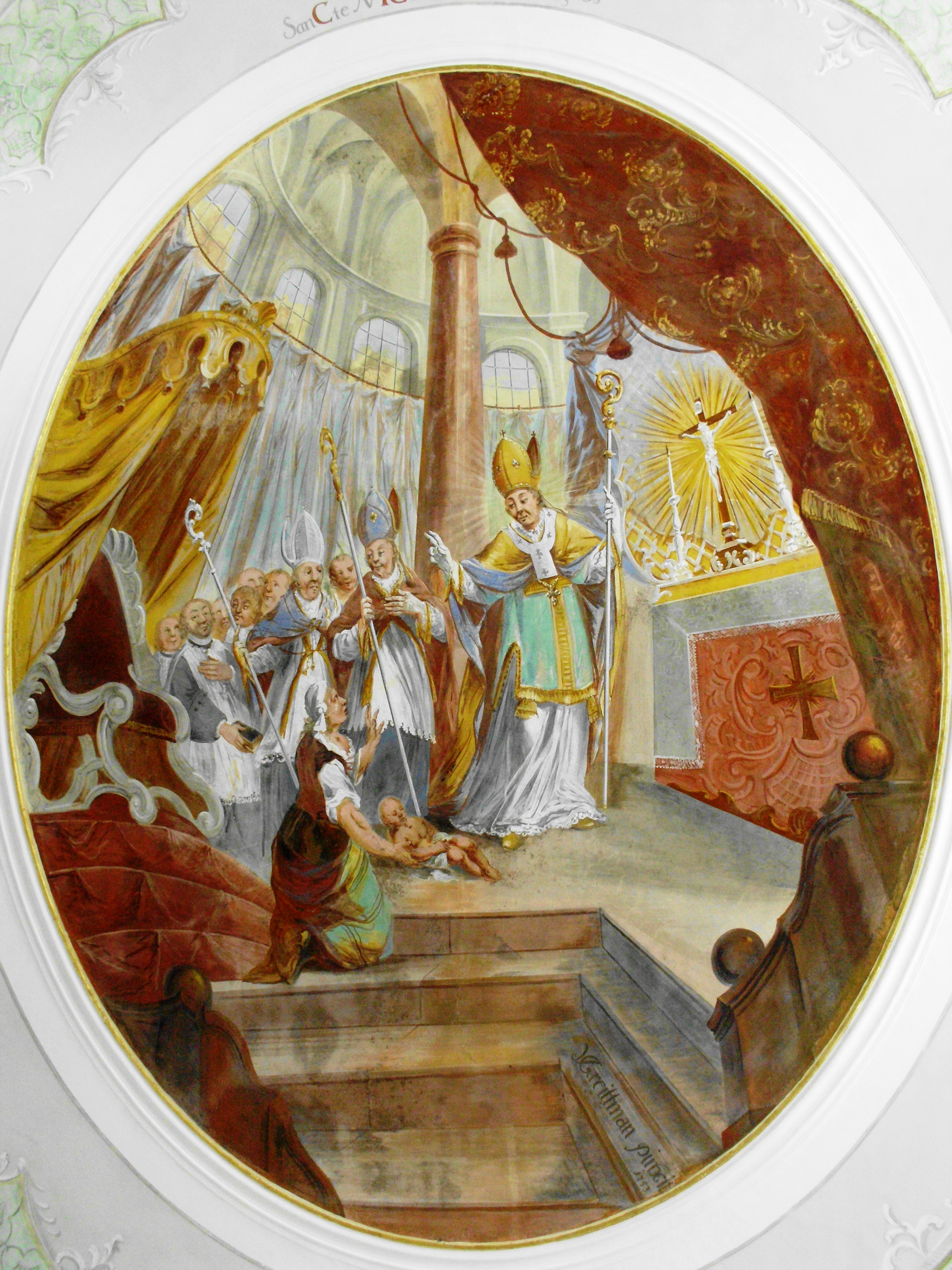 Warching, Landkreis Donau-Ries, Kirche St. Nikolaus, Langhaus-Hauptfresko von Vitus Greitman(n)